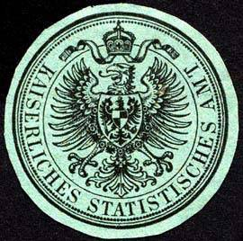 Sealing stamp Title: Kaiserliches Statistisches Amt Description: Briefsiegel, blaugrau, schwarz Place: size: 3 cm